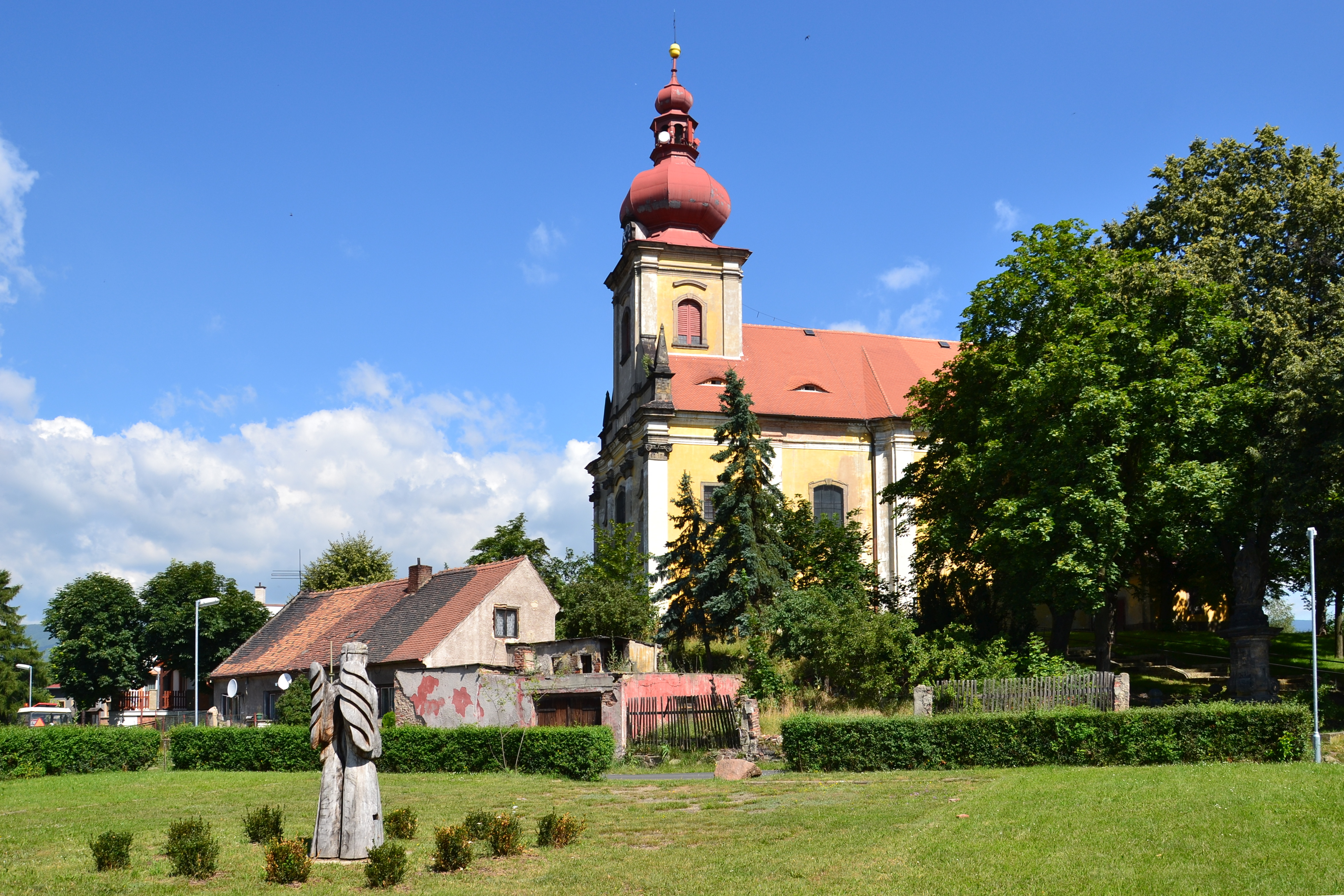 Kostel svatých Petra a Pavla, na návrší ve středu obce, Jeníkov (okres Teplice).